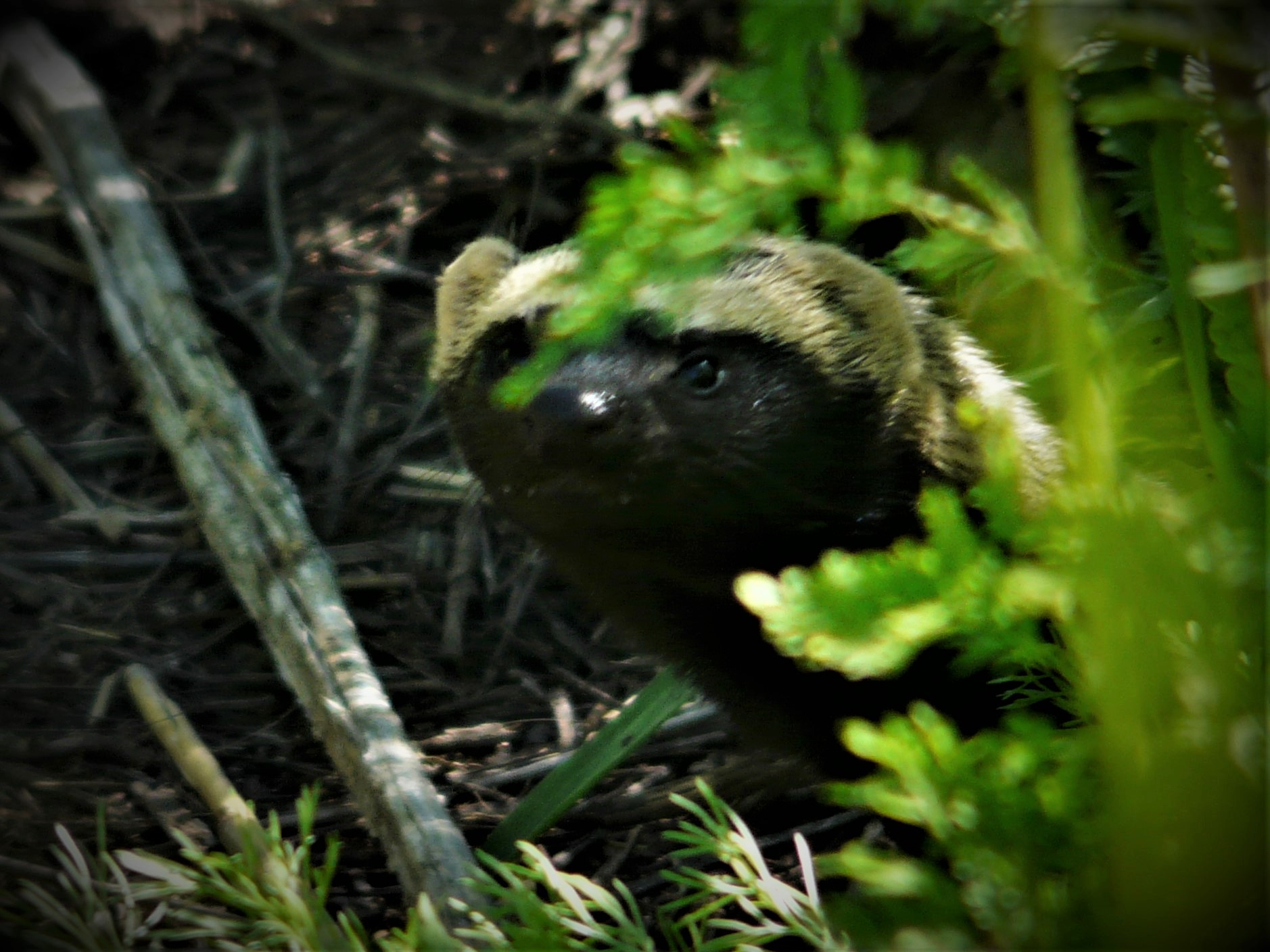 Hurón Menor, registrado en el Área Natural Protegida Florindo Donati, UNR (27/10/2011) Galictis cuja (Molina, 1782) Furão-pequeno Familia: Mustelidae Orden: Carnivora Clase: Mammalia Filo: Chordata Reino: Animalia